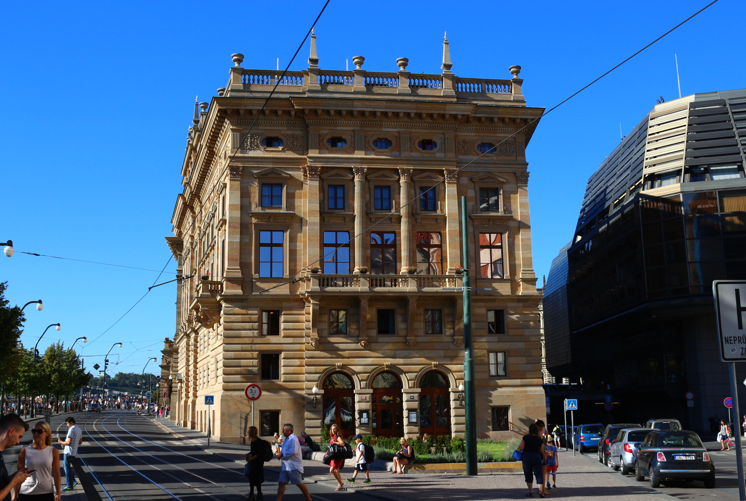 Národní divadlo - Prozatímní divadlo